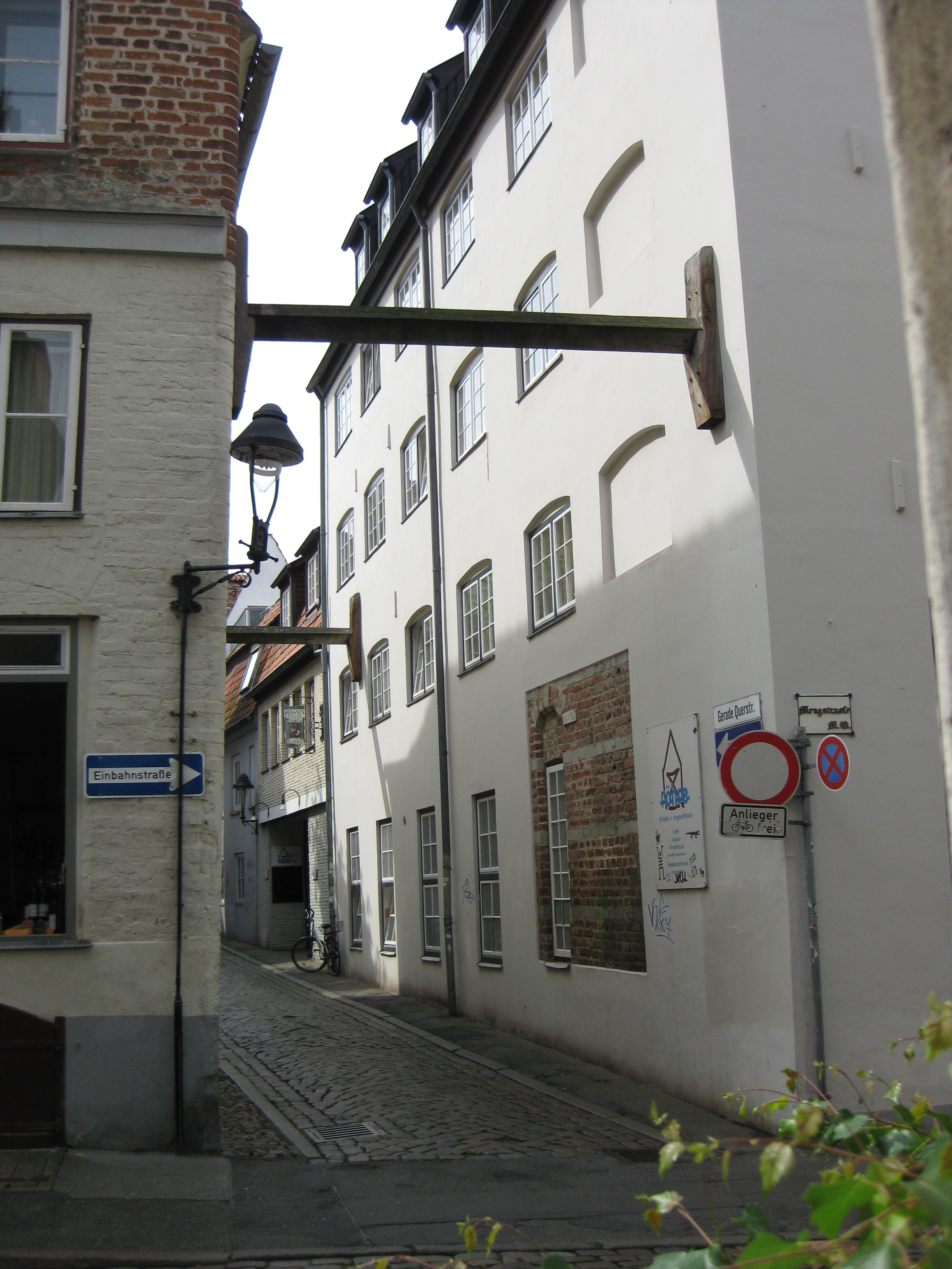 Schwibbogen in der Geraden Querstraße an der Ecke zur Mengstraße. Rechts die Jugendherberge und das Jugendzentrum Röhre.